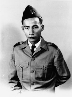 Trình Minh Thế